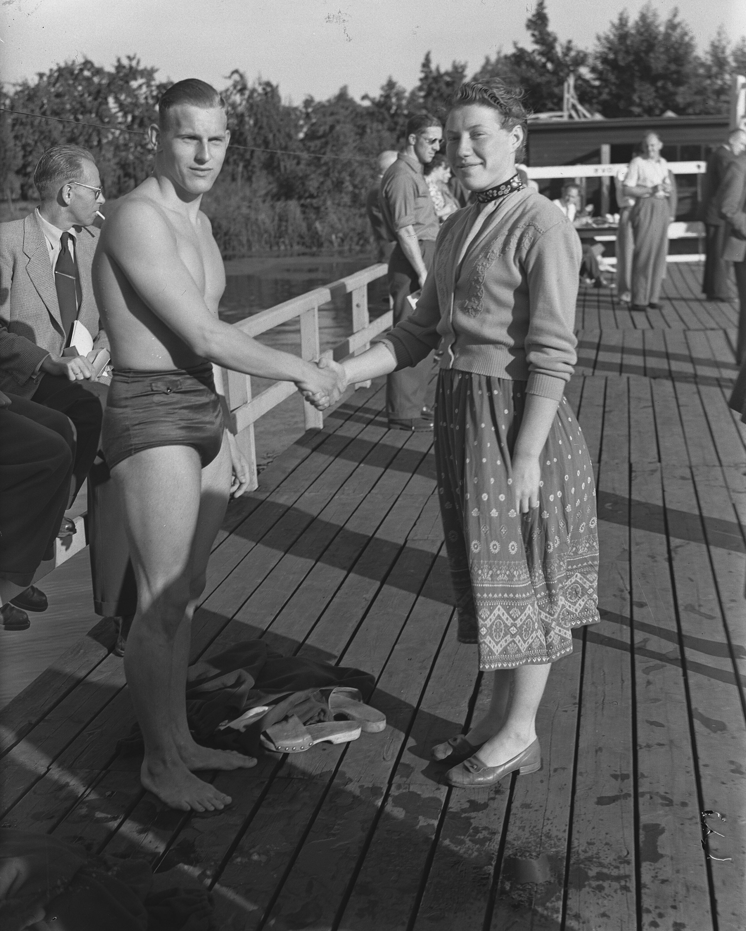 Collectie / Archief : Fotocollectie Anefo Reportage / Serie : [ onbekend ] Beschrijving : Piet ten Thije felitciteert mejuffrouw van Brenk Datum : 8 augustus 1953 Locatie : Utrecht (stad) Trefwoorden : zwemmen Persoonsnaam : Brenk, T. van, Thije, Piet ten Fotograaf : Rossem, Wim van / Anefo Auteursrechthebbende : Nationaal Archief Materiaalsoort : Glasnegatief Nummer archiefinventaris : bekijk toegang 2.24.01.09 Bestanddeelnummer : 905-8712